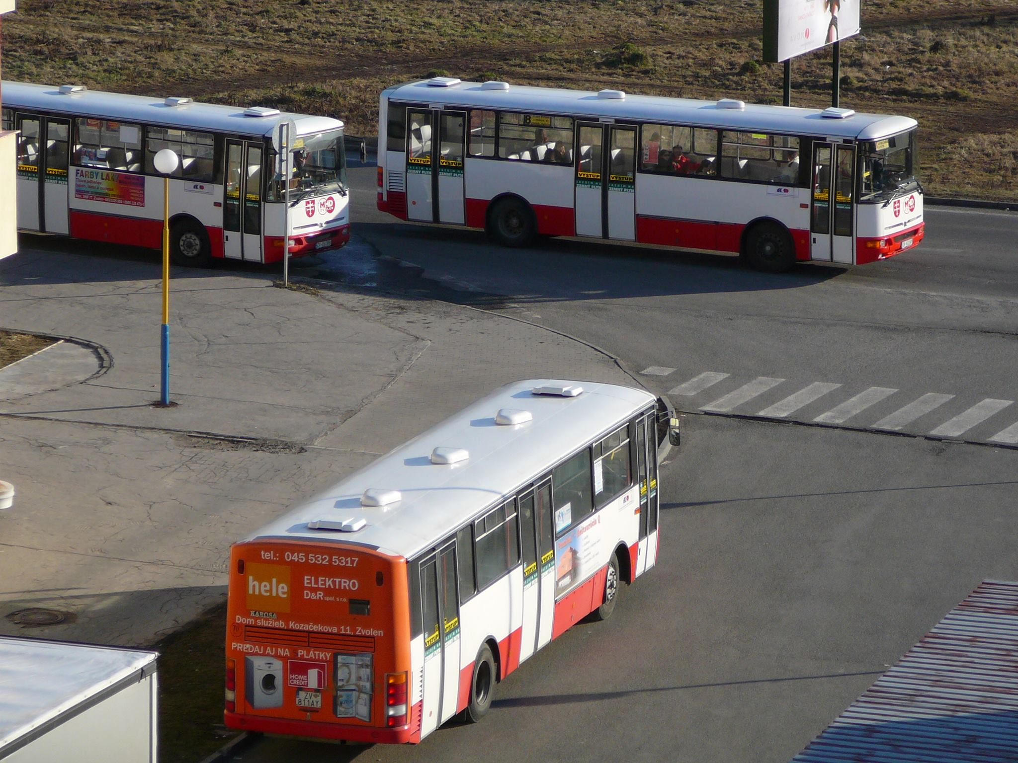 MHD ZVOLEN autor Jozef Brzula